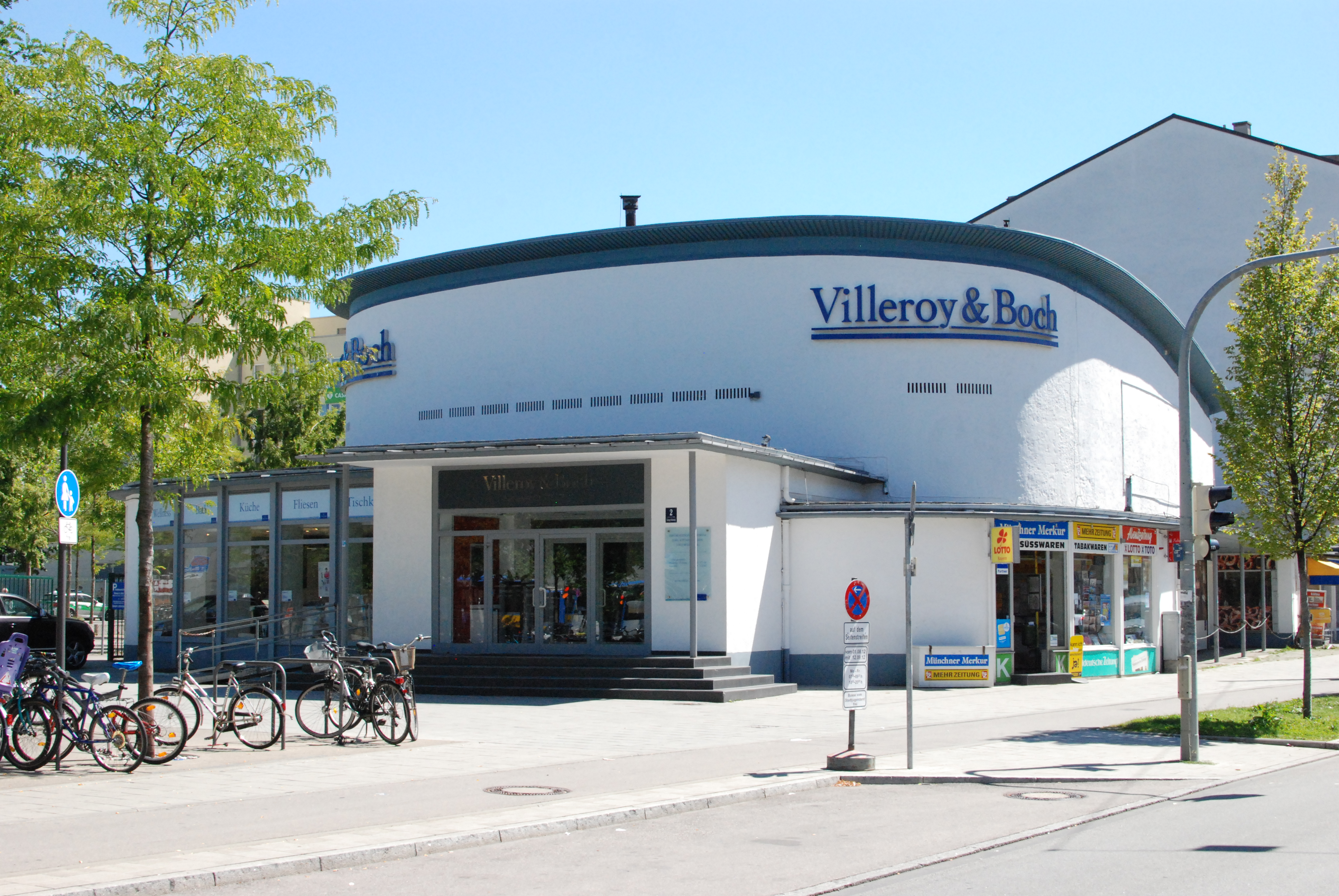 Ehemaliges Bahnhofskino "Ba-Ki", sogenannte "Giesinger Flunder" am Giesinger Bahnhofsplatz in Obergiesing, München, Regierungsbezirk Oberbayern, Bayern. 1952 von den Architekten Konrad Stierhof und Hanns Fichtl errichtet, seit 1971 Nutzung als Ausstellungsraum von Villeroy&Boch..